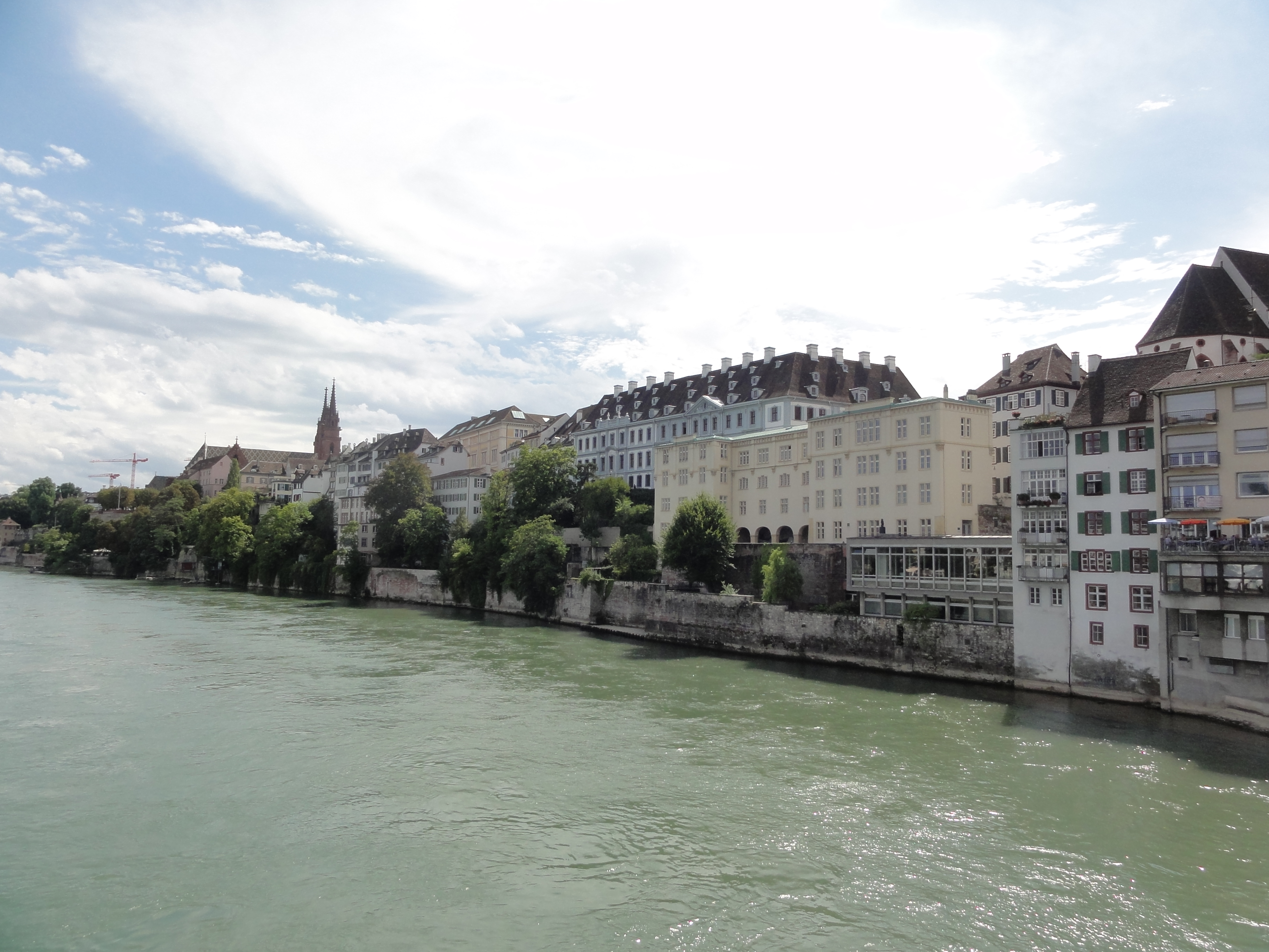 Basel BS — Gebäude am Rheinsprung uferseitig Info GPS data may be inaccurate. EXIF data regarding date and time may be inaccurate.